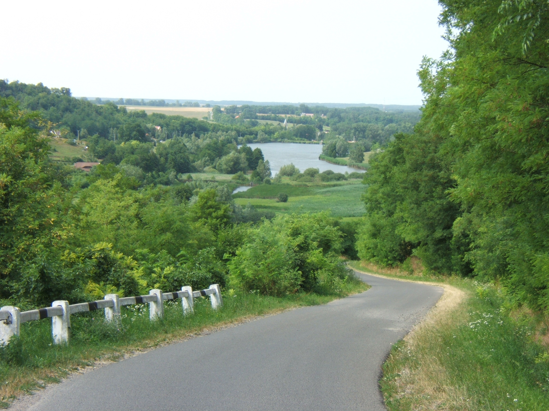 A Bárdudvarnokhoz (Somogy vármegye) tartozó Petörke-völgy látképe 2011 nyarán.